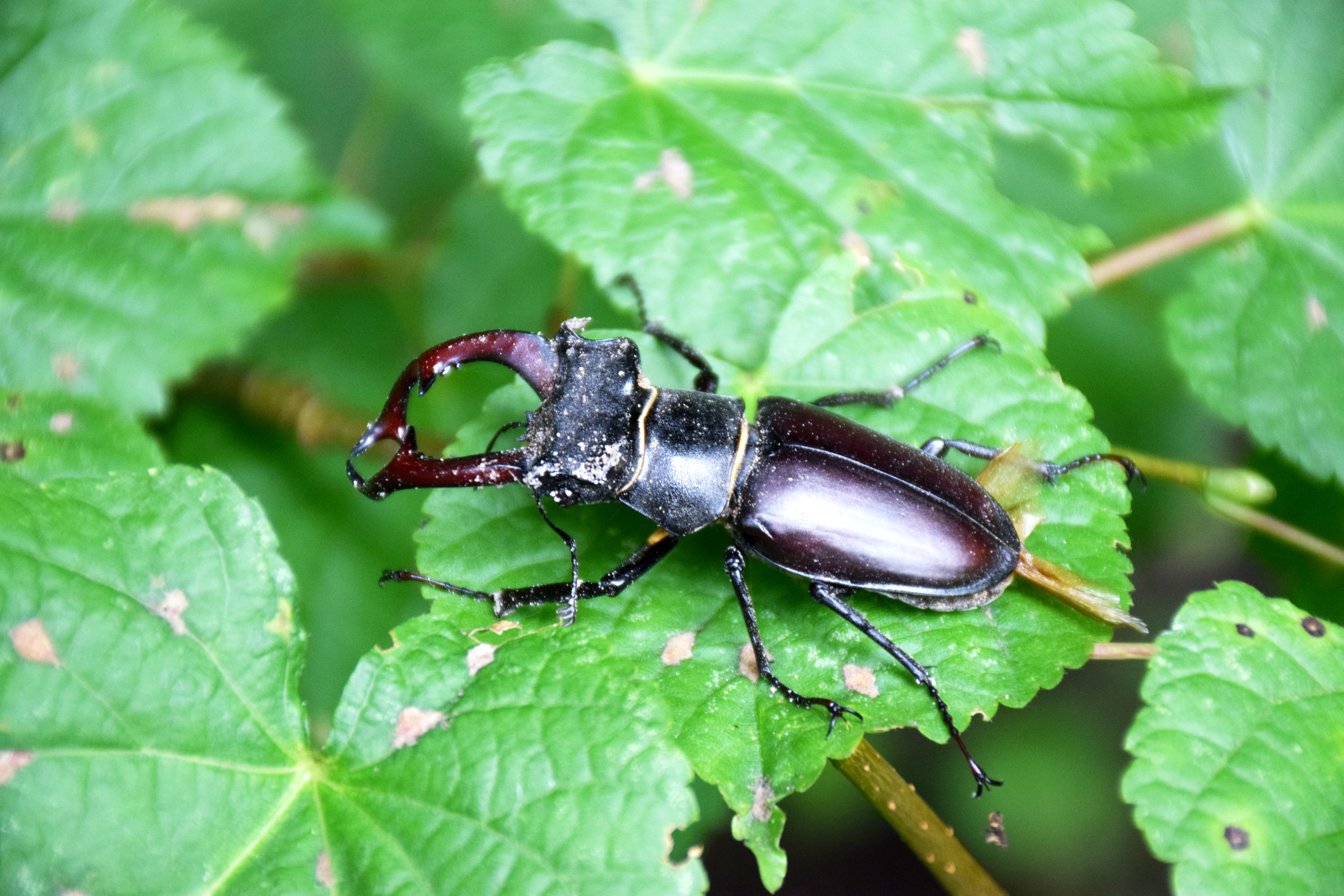 Жук-олень, рогач звичайний Lucanus cervus cervus (Linnaeus, 1758)